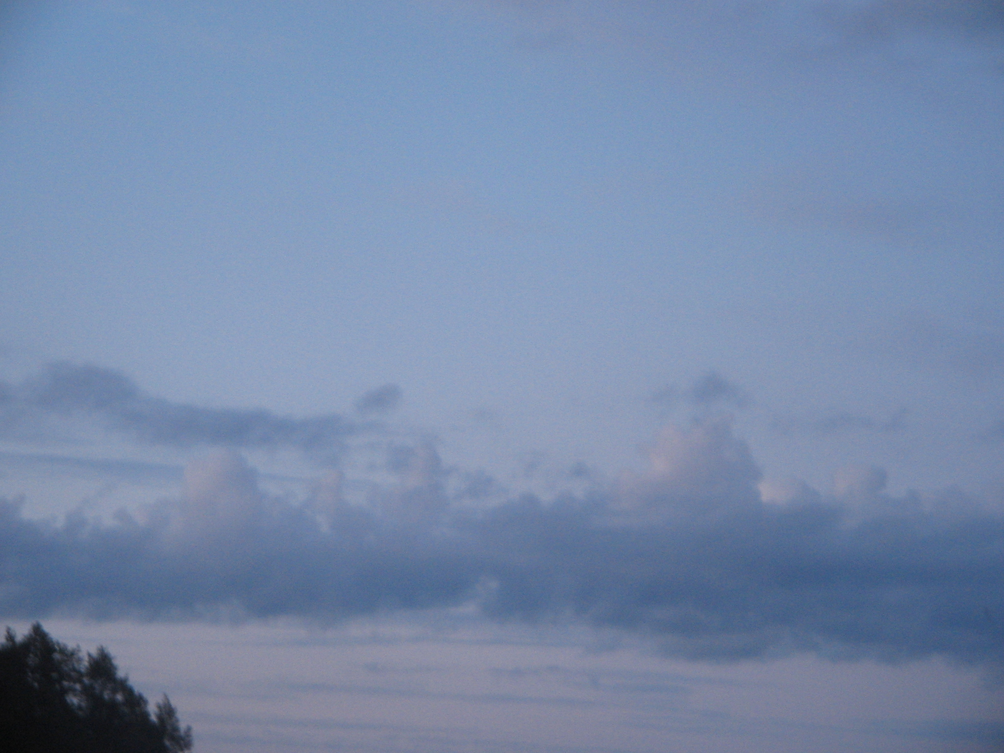 Stratocumulus castellanus, Finland